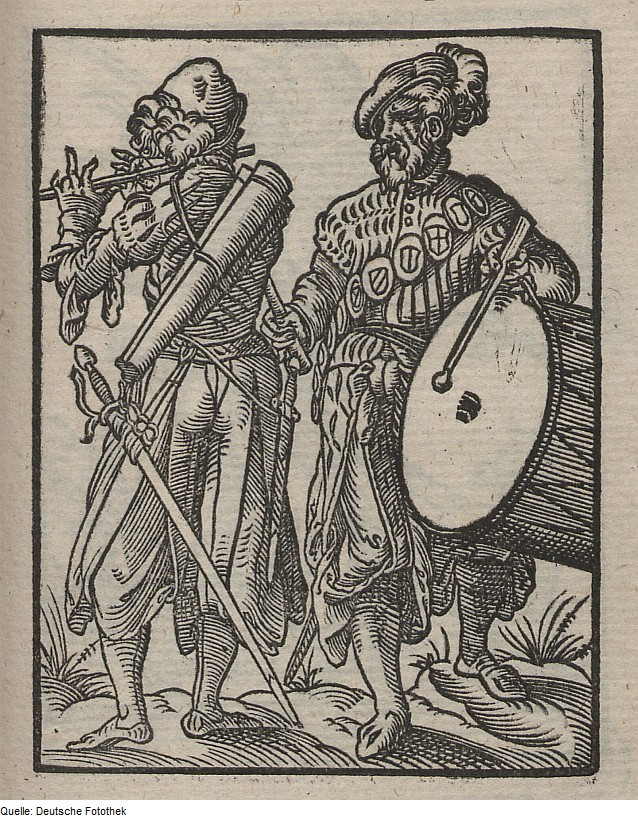 Original image description from the Deutsche Fotothek Ständebuch & Militär & Pfeifer & Trompeter & Schalmeienbläser & Trommler & Pauker